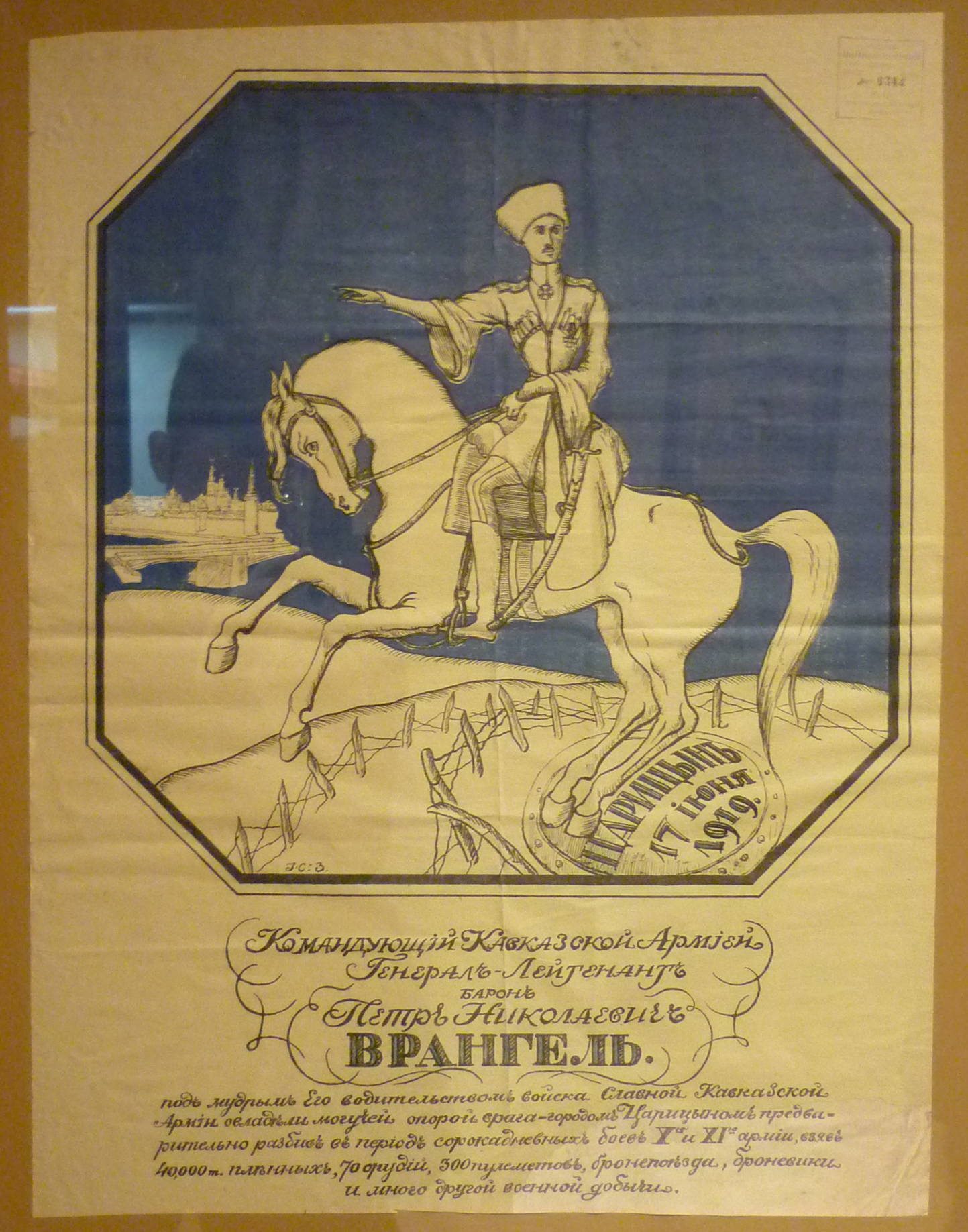 Affiche blanche montrant le commandant de l'armée du Caucase le général Wrangel après la prise de Tsaritsyne